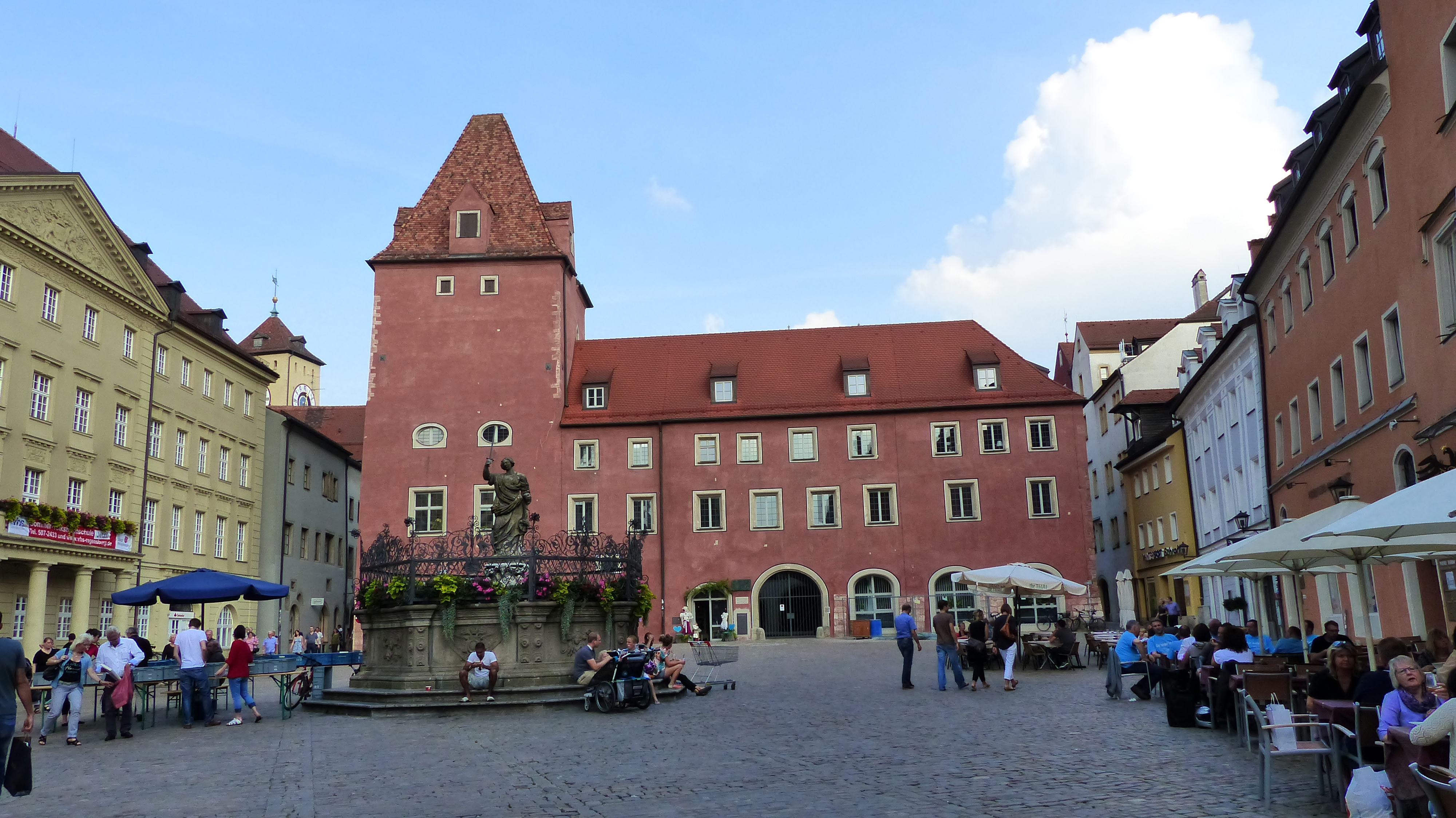 Denkmalgeschütztes Haus, Haidplatz 1, RegensburgThis is a photograph of an architectural monument.